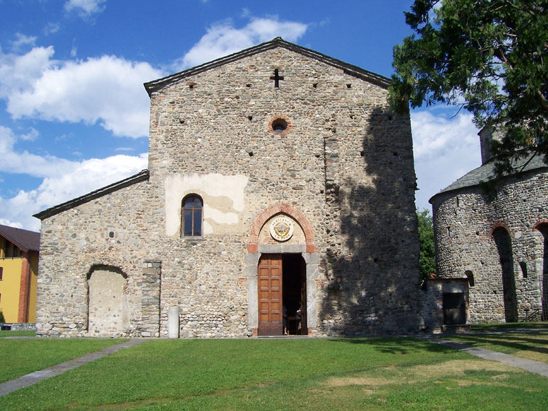 Basilica San Vincenzo - Cantù